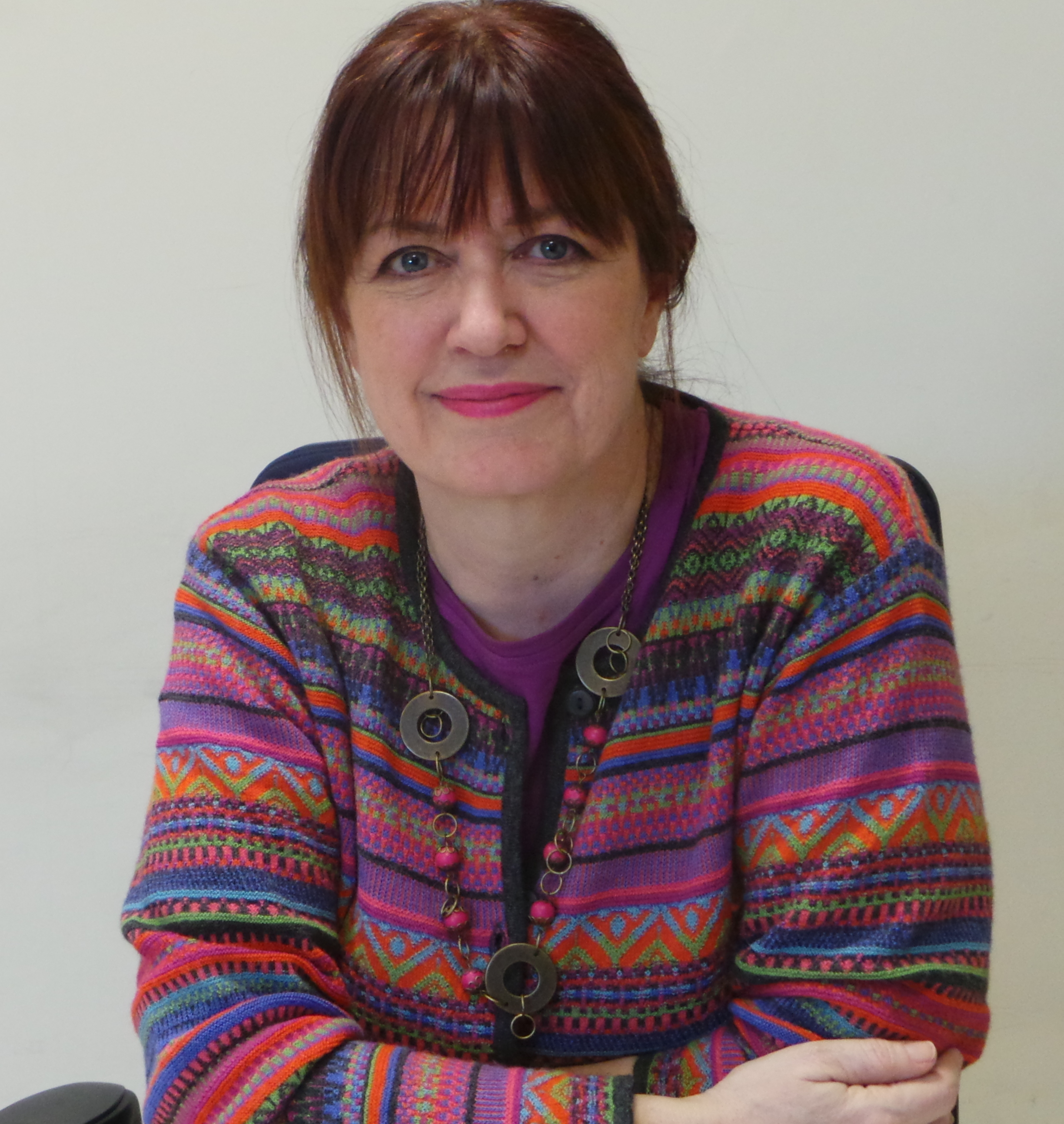 Directora del Instituto de Estudios de la Mujer Universidad Autónoma de Madrid